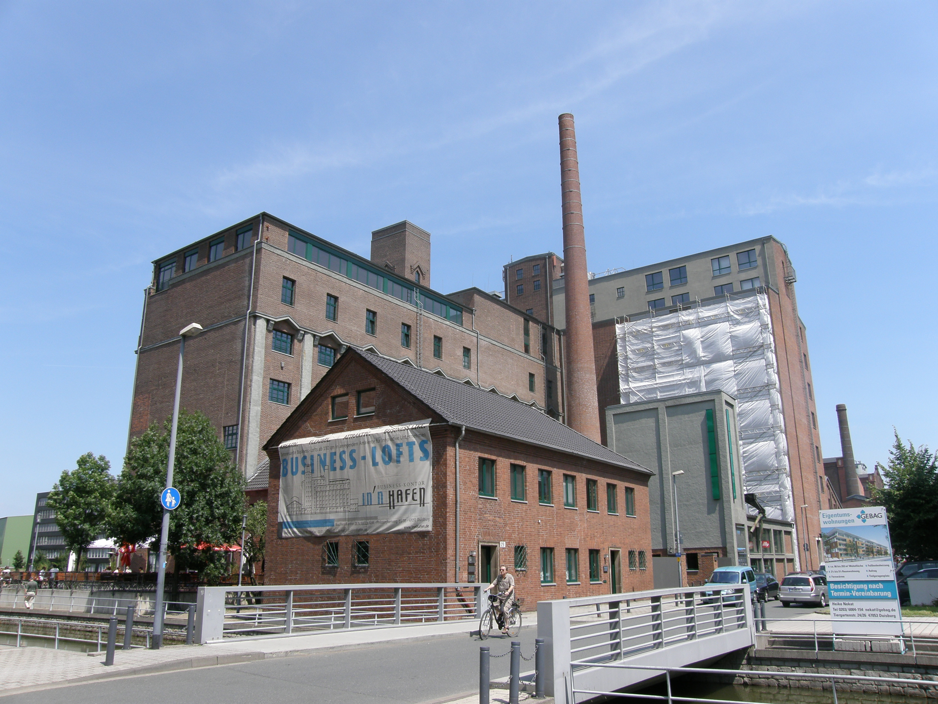 Werhahnmühle im Innehafen von Duisburg mit Kesselhaus, Schornstein und Silos, Blick über die Speichergracht zum östlichen Teil des Gebäudekomplexes